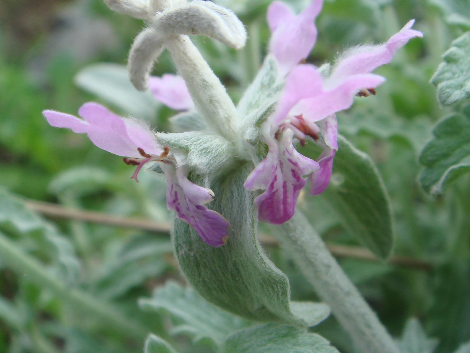 (Stachys fontqueri), Ceuta, España.